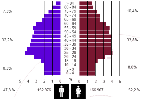 Pirámide de población de Valladolid (Padrón 2006)